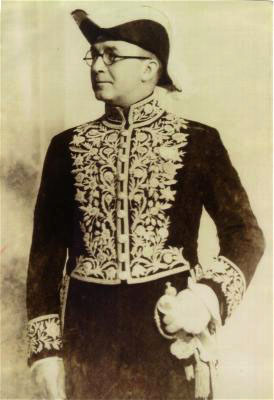 Ali Akbar Khan Bahman, Iranian Ambassador